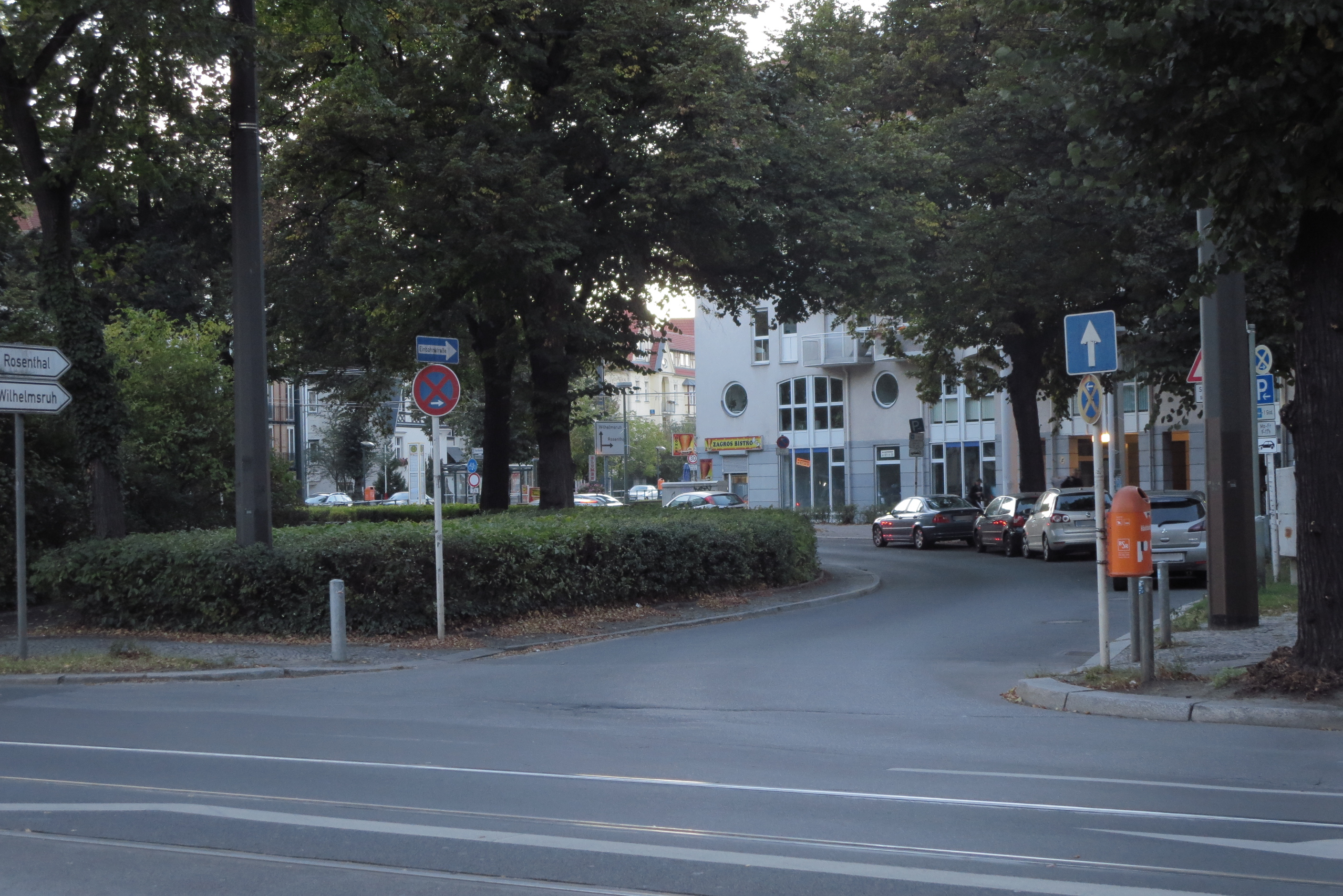 Pastor-Niemöller-Platz in Berlin-Niederschönhausen